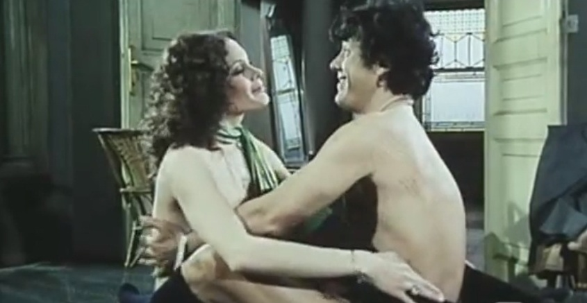 Screenshot dal film Ultimo tango a Zagarol (1973) di Nando Cicero